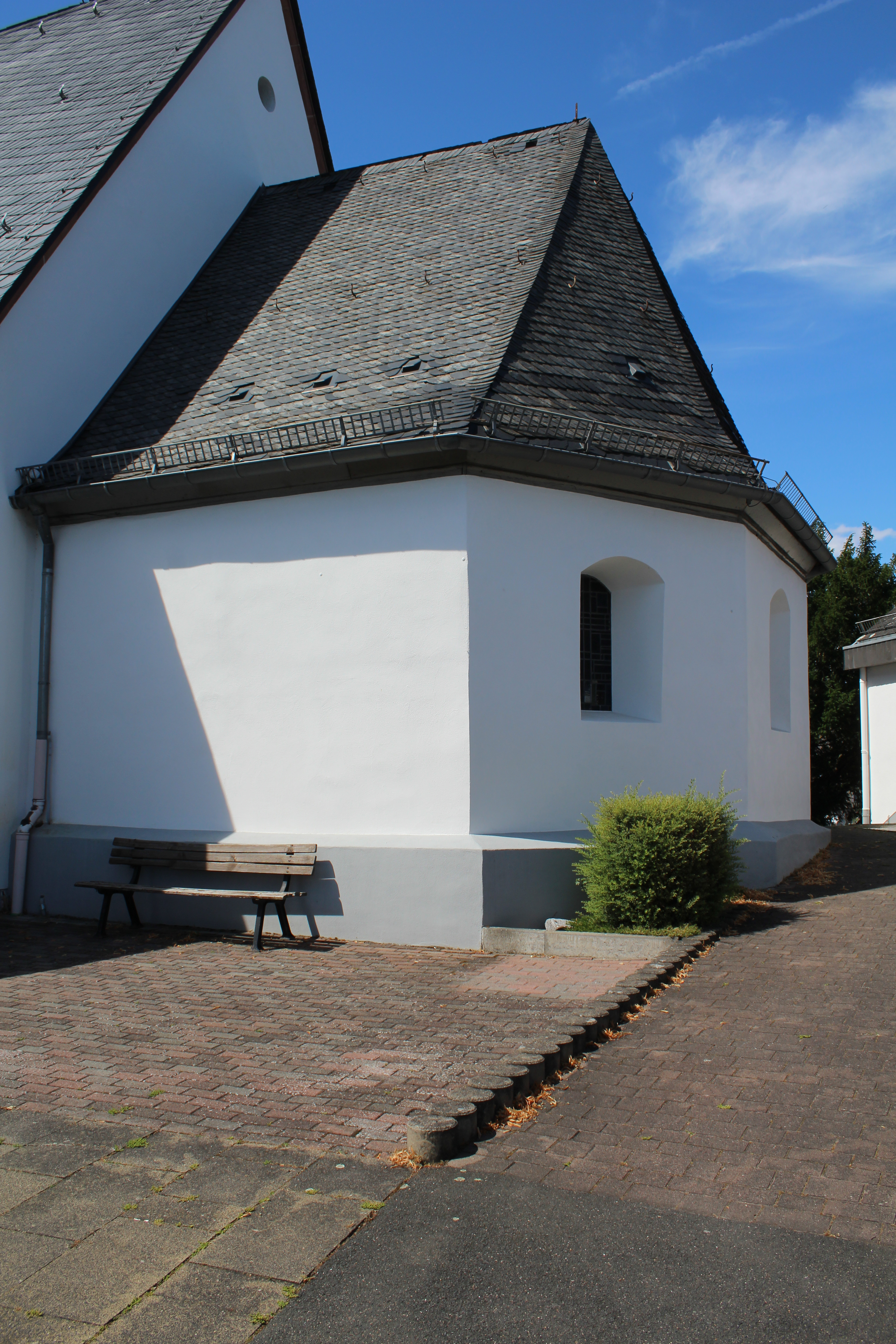 Evangelische Kirche Niederwetz, Gemeinde Schöffengrund, Hessen, Deutschland